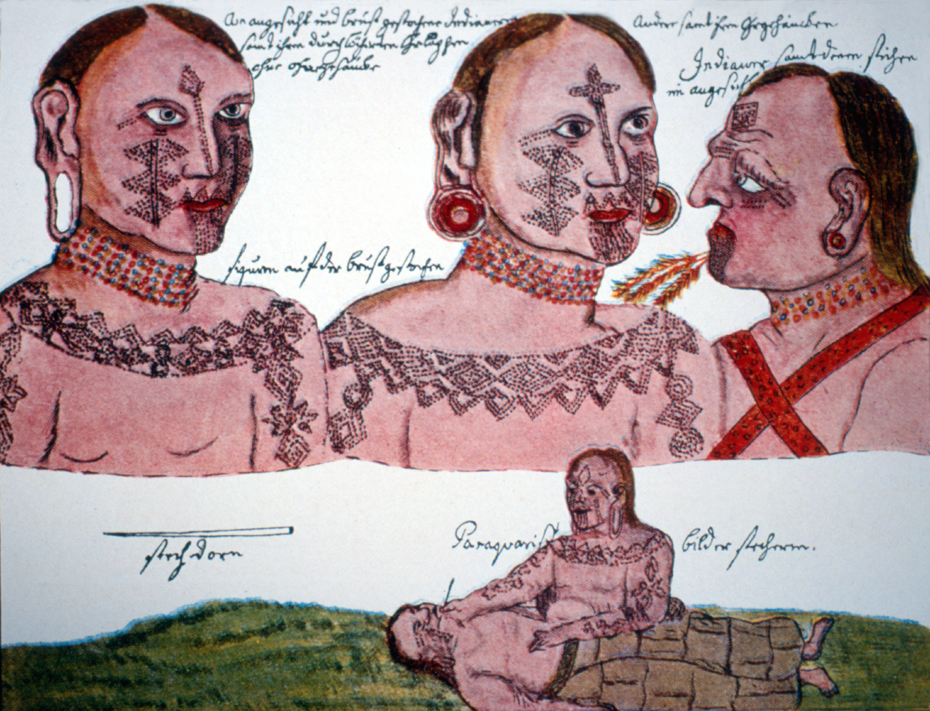 Representación de aborígenes Abipones pintados, tribu que habitaba antiguamente la provincia de Santiago del Estero, Argentina.